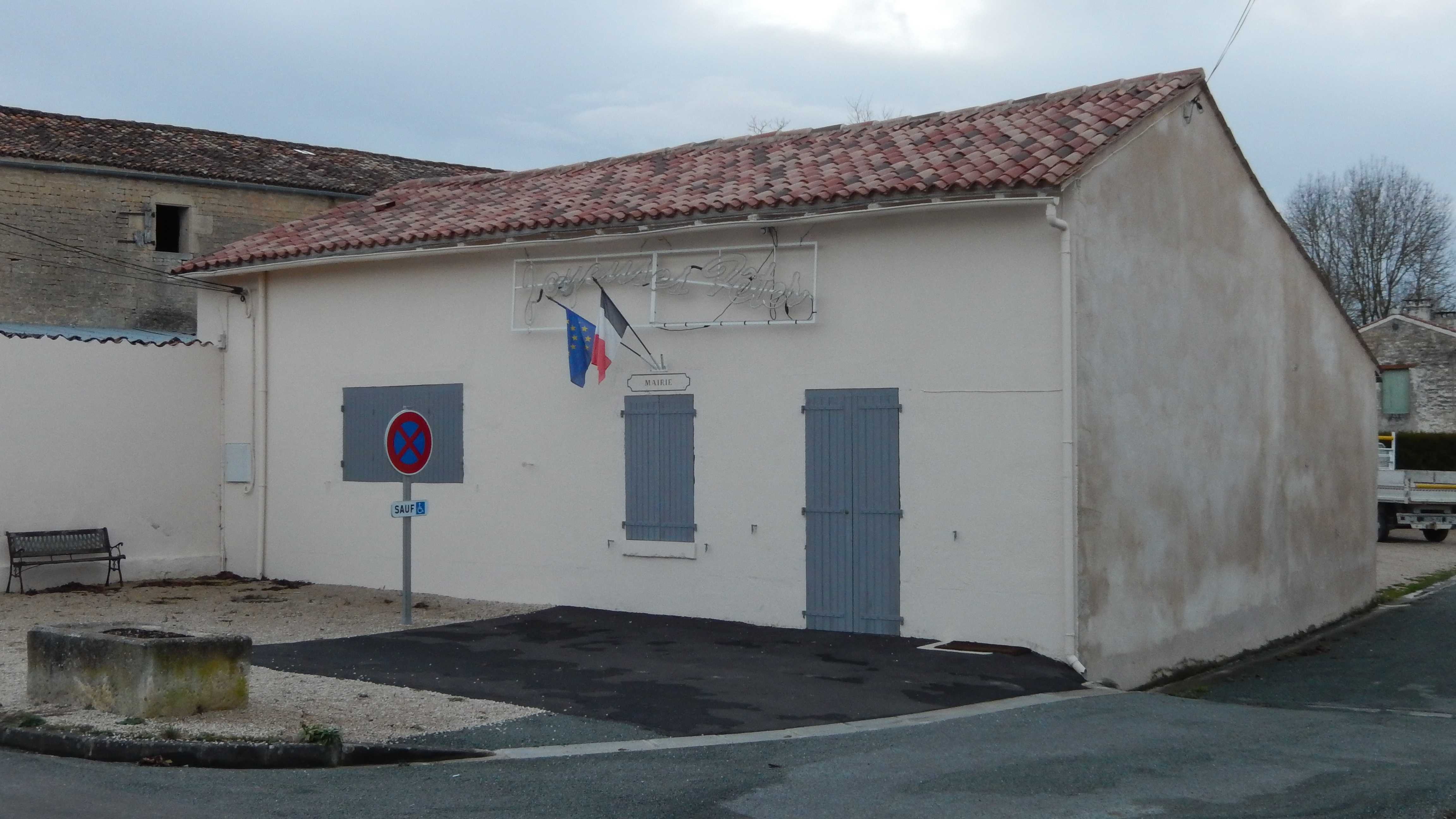 La mairie de Blanzay-sur-Boutonne, en Charente-Maritime.